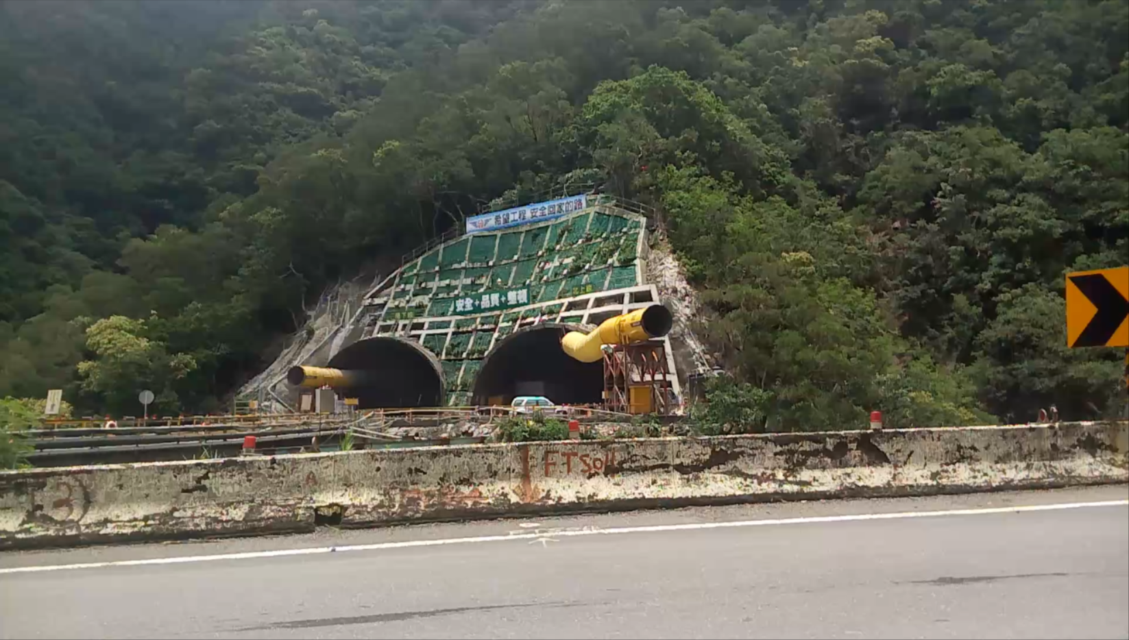 中文（台灣）: 台9線南迴公路拓寬改善後續計畫草埔隧道南口